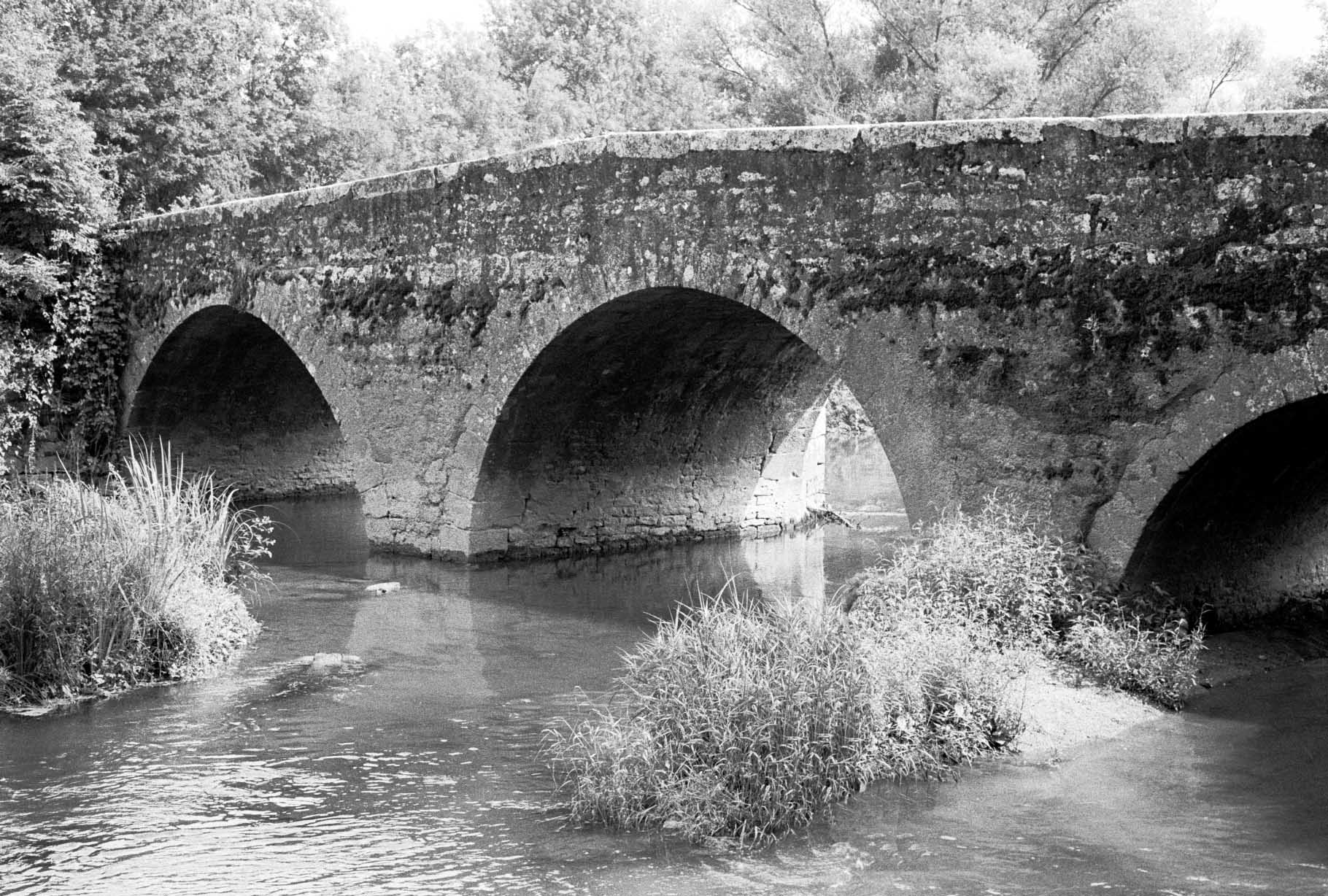 Le pont romain de Quincerot